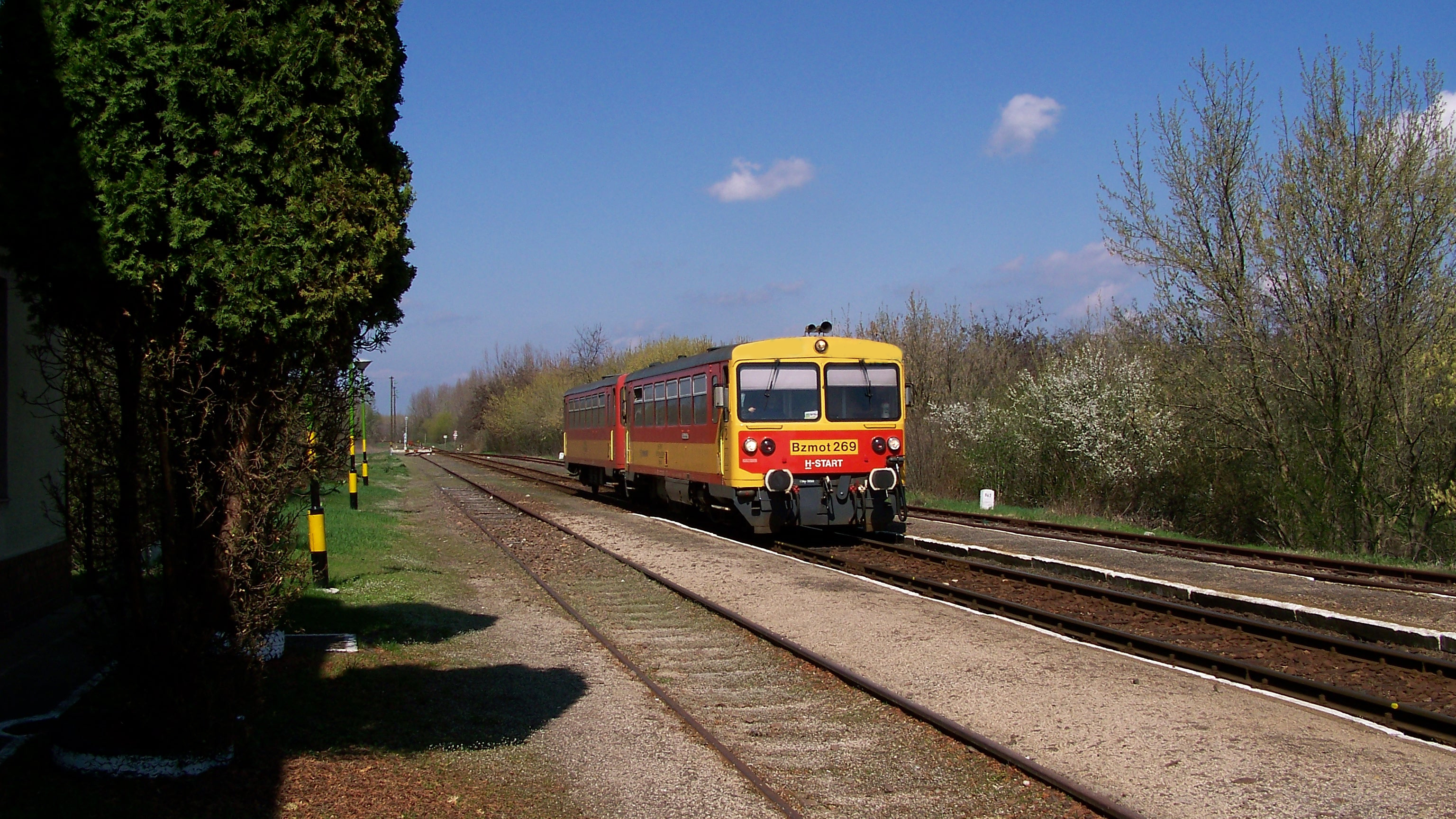 Bzmot érkezik